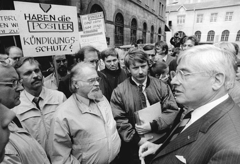 ADN- Jan-Peter Kasper 24.9.90 Gera: Geras Postler sehen schwarz- Die Forderungen nach Rationalisierungsschutz wie bei der Bundespost, nach Nettolohn-Ausgleich und Teuerungszulage mußte sich Bundespostminister Schwarz-Schilling bei einer Protestkundgebung der Postgewerkschaft anhören.